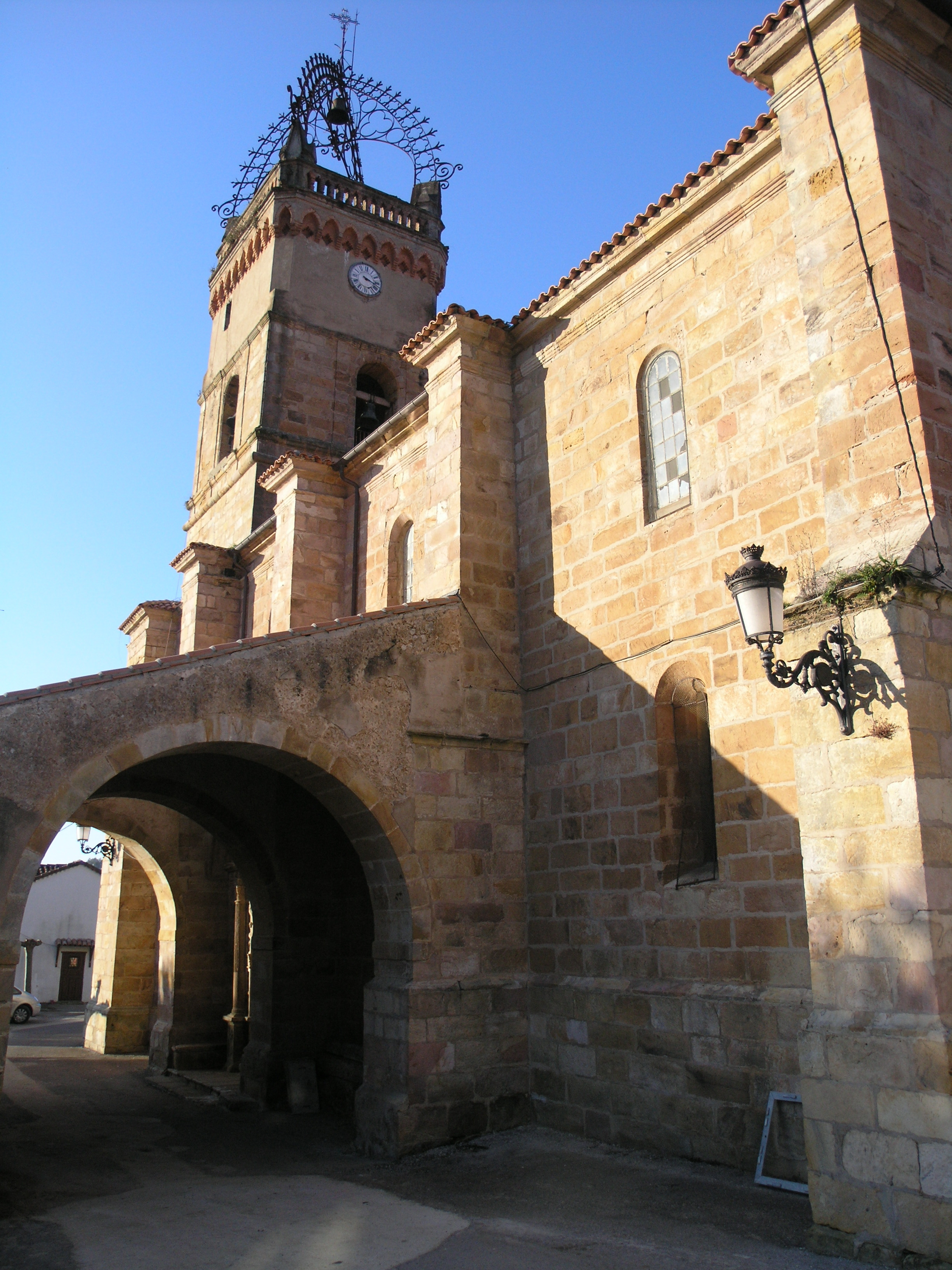 Iglesia de Nuestra Señora de la Asunción en Novales (Alfoz de Lloredo), Cantabria, España. Mediados del siglo XVI. Estilo renacentista. Bien inventariado, incluido en el Inventario General del Patrimonio Cultural de Cantabria en 2001